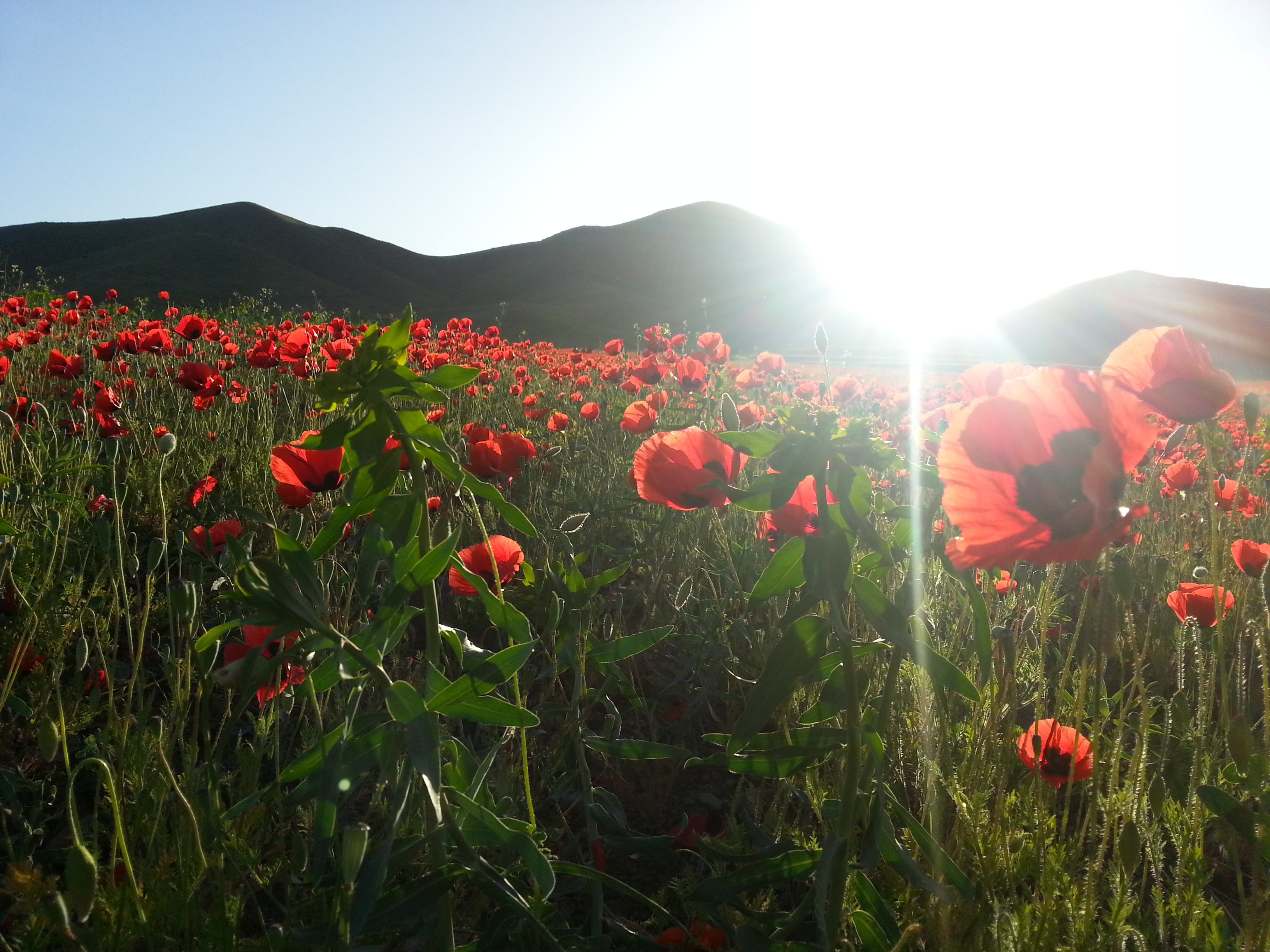 دشت شقایق_اردیبهشت